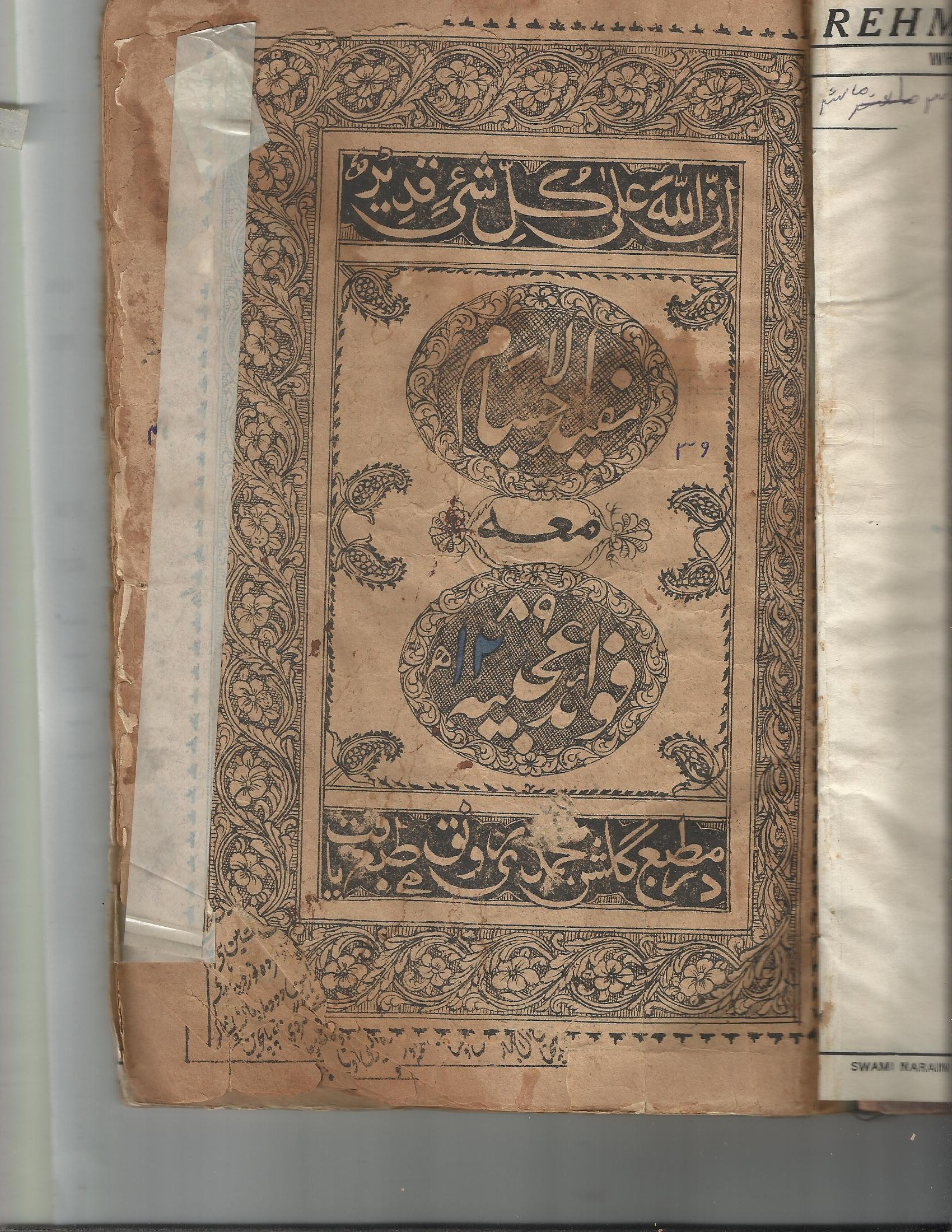 Urdu Printed book on Medical/physiology printed around 1868 AD